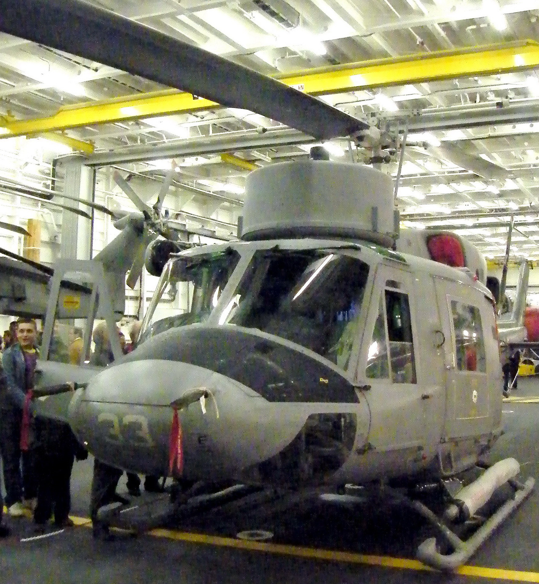 Elicottero AB 212 nell'hangar della portaerei Cavour